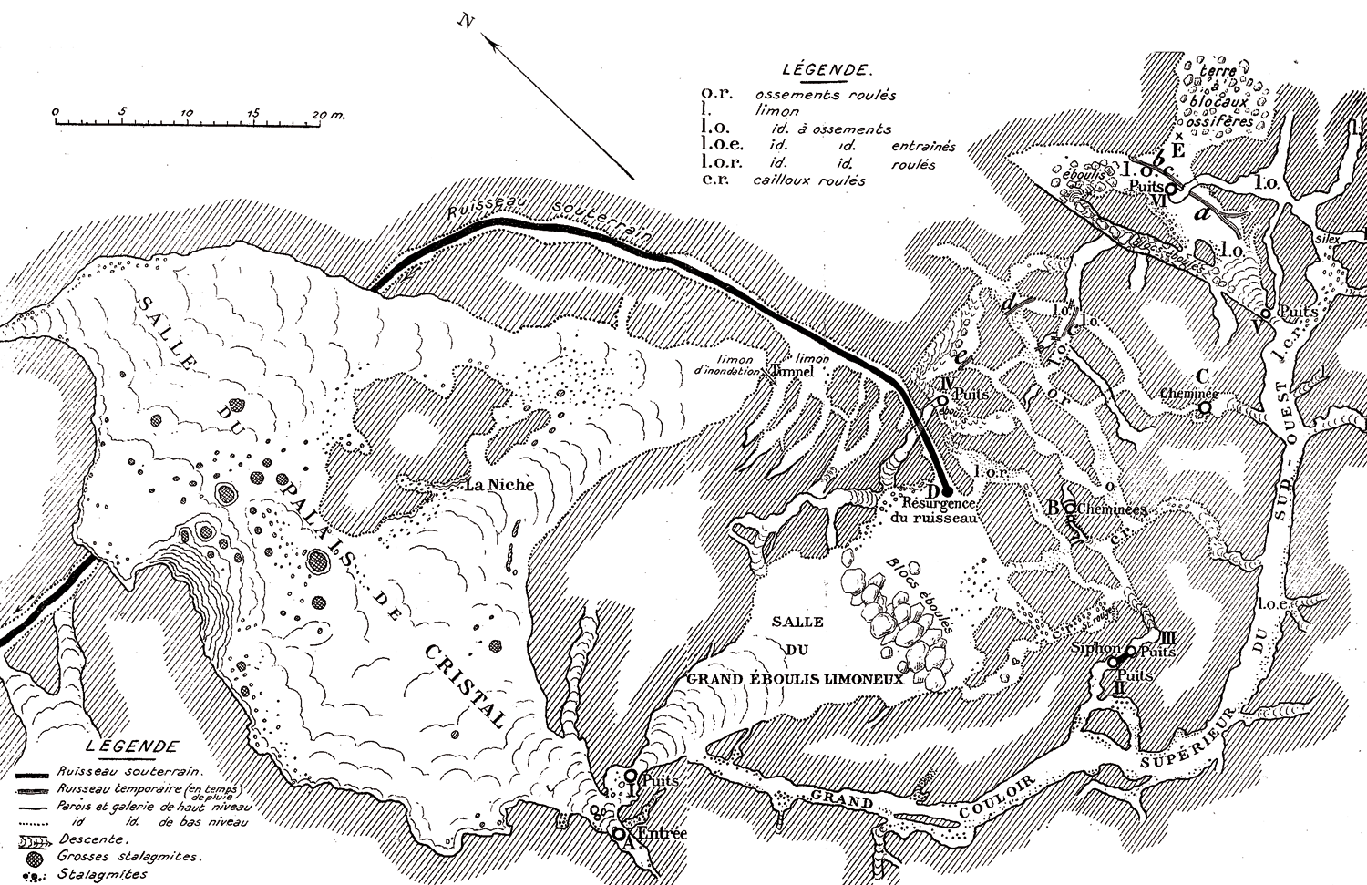 Plan de la grotte de Rosée, à Engihoul, ancienne commune d'Éhein, actuelle commune d'Engis, Belgique